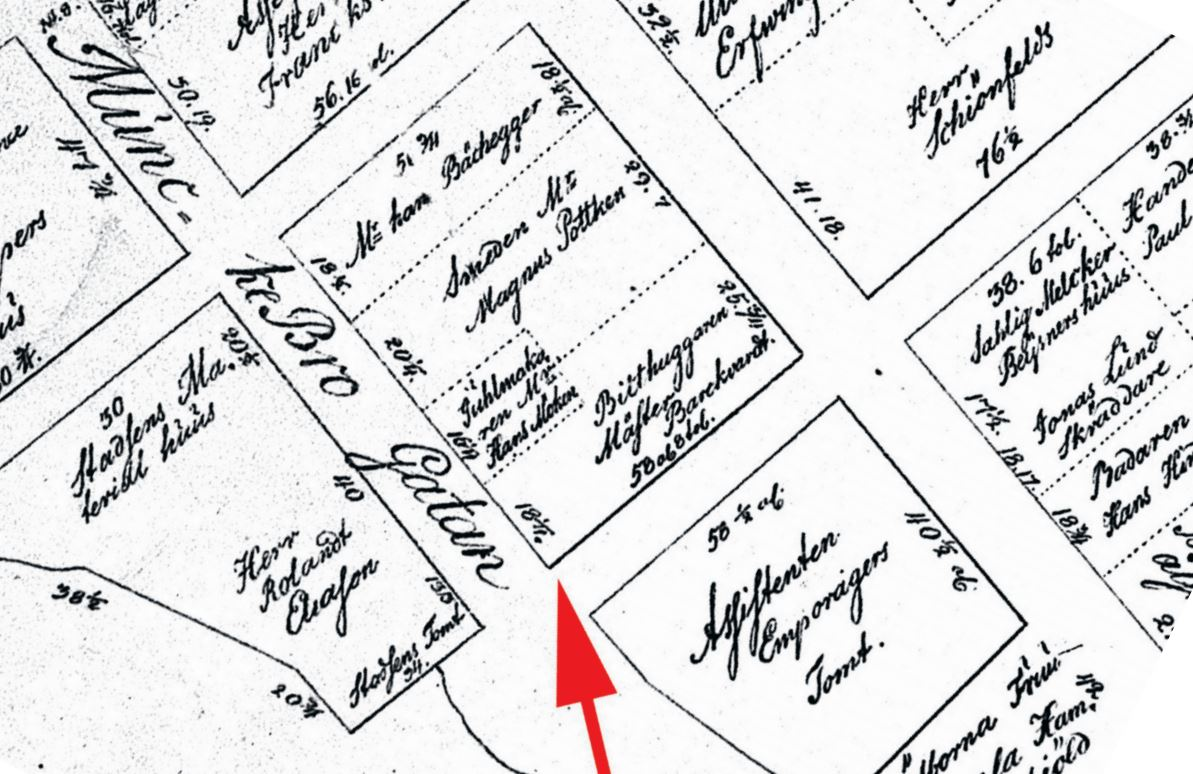 Stadsplanering sydvästra Stadsholmen med kvarteret Daedalus och tomtägare omkring 1700